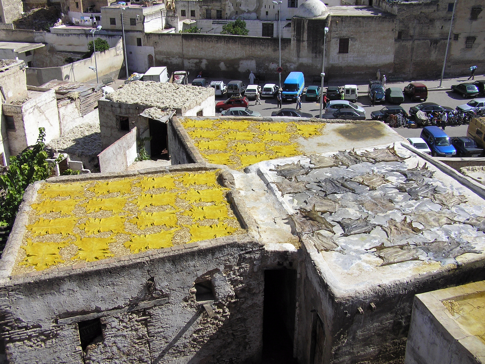 Teils schon gefärbte Häute und Felle zum Trocknen auf Dächern im Gerberviertel von Fes, Marokko